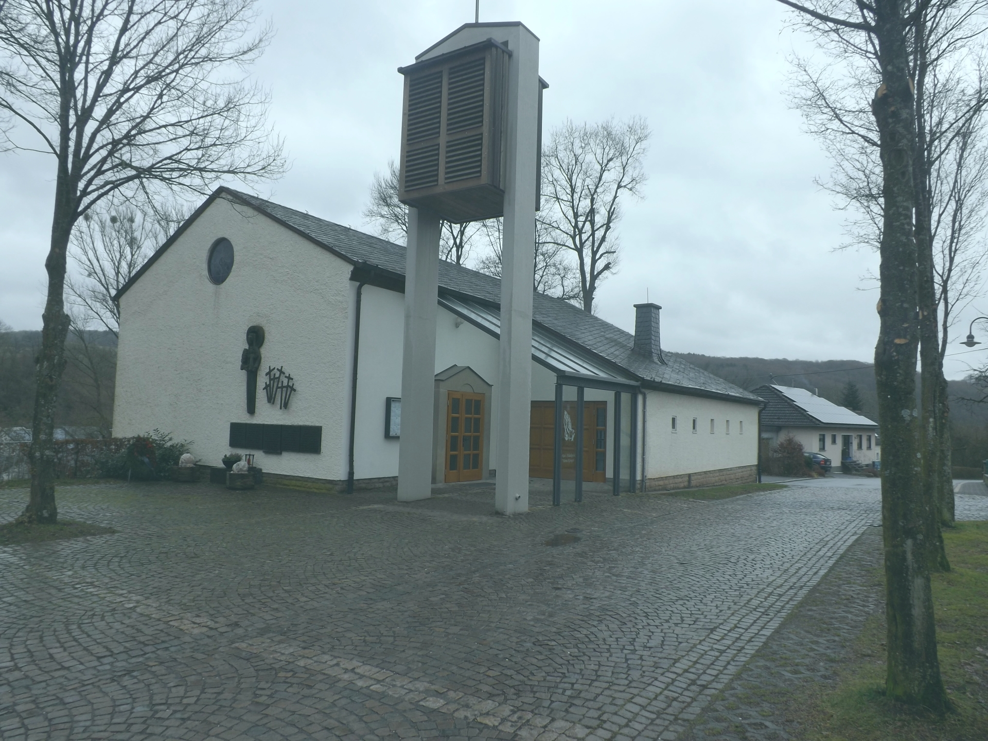 Kirche von Ausen